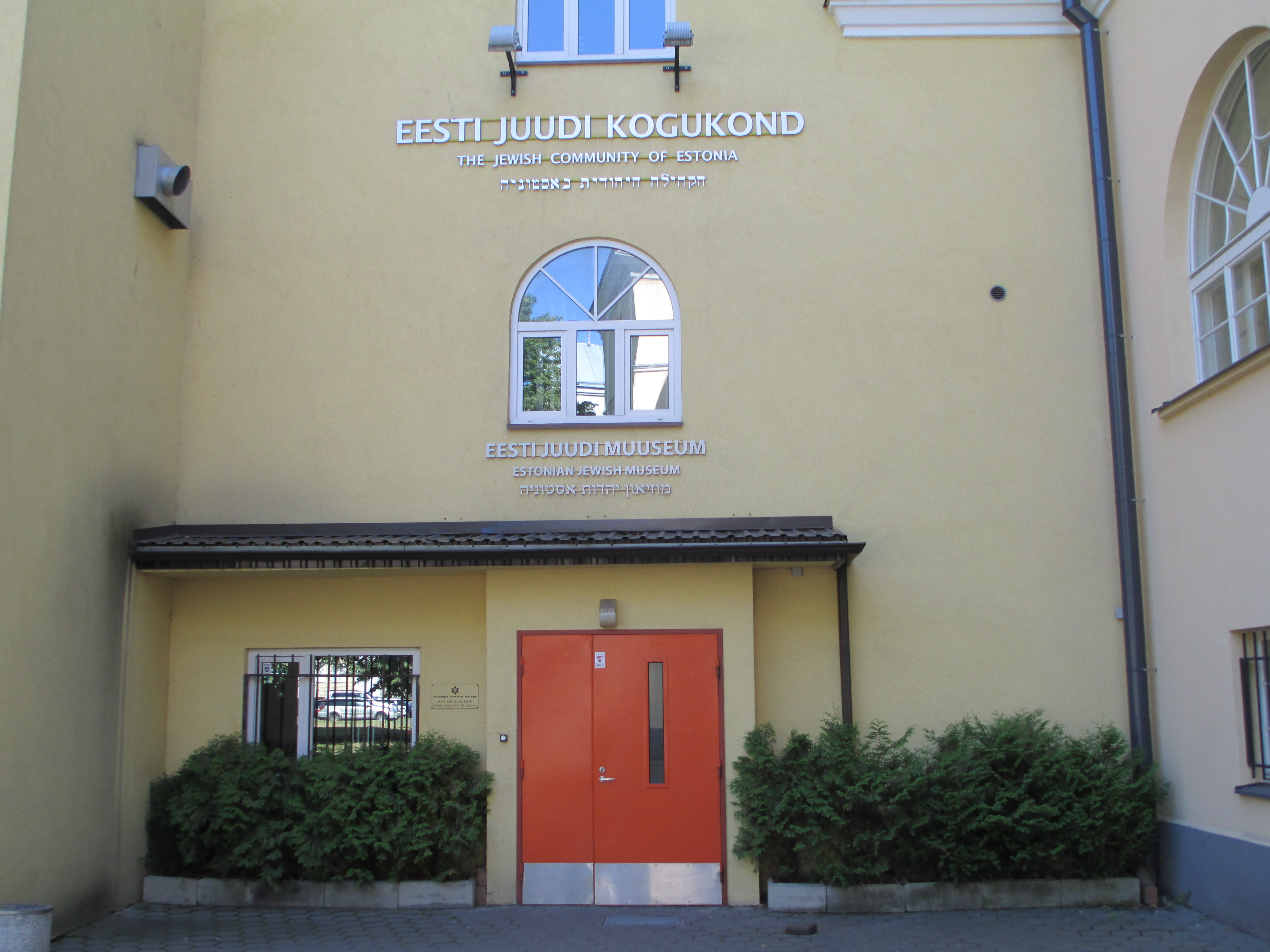 מוזיאון יהדות אסטוניה בטאלין